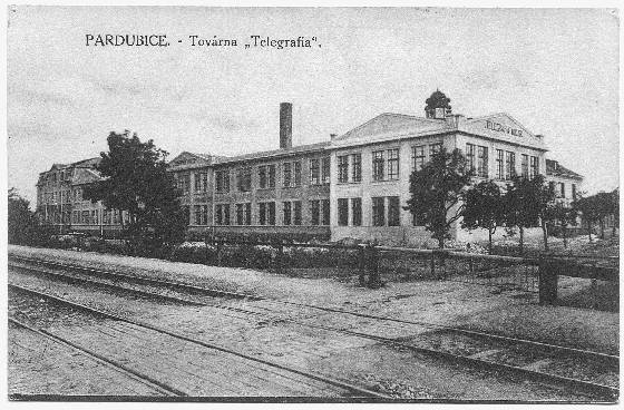 Továrna Telegrafie, Pardubičky?